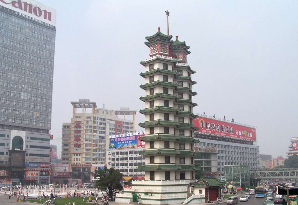 二七纪念塔